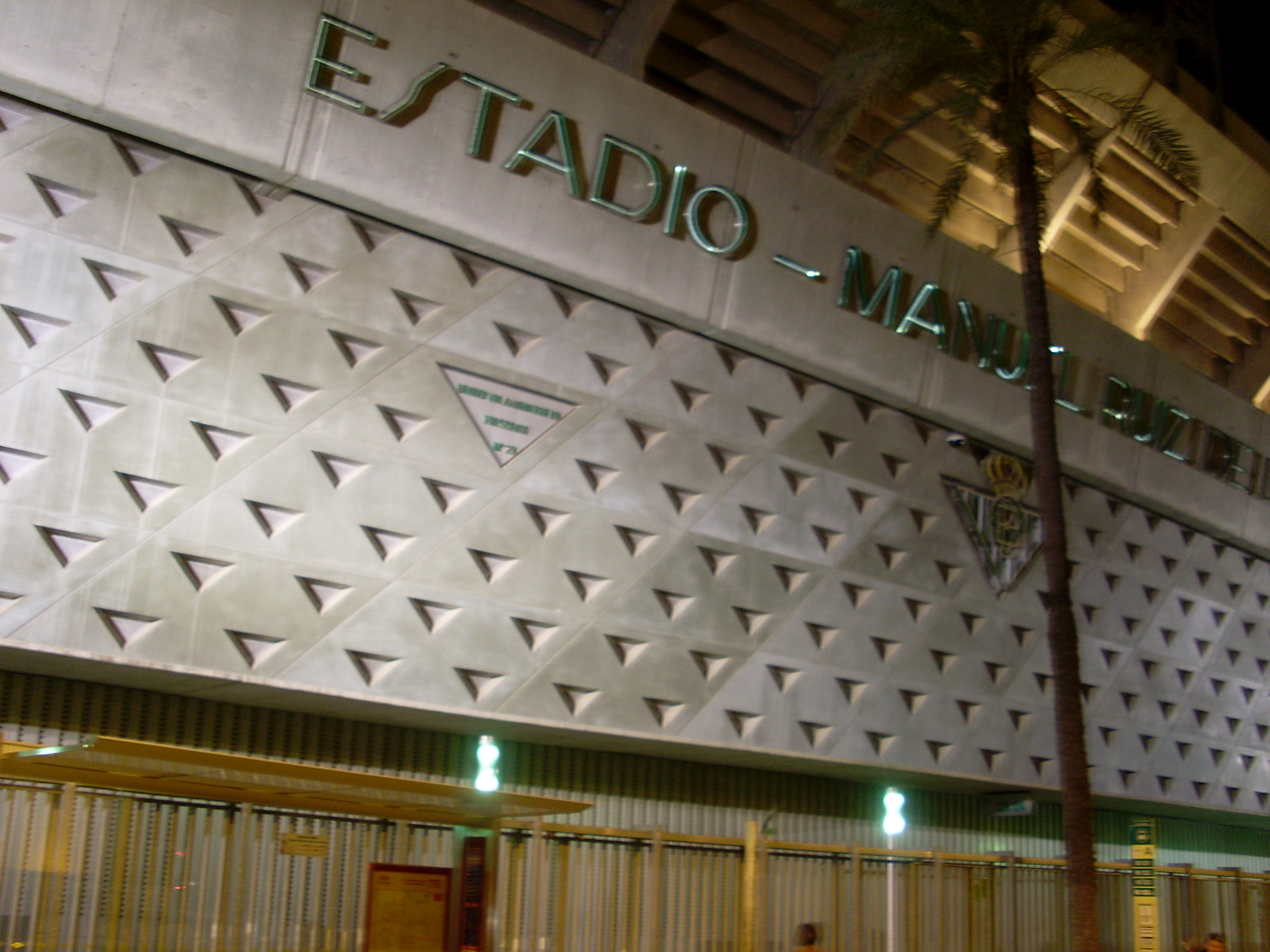 Estadio Manuel Ruiz de Lopera.